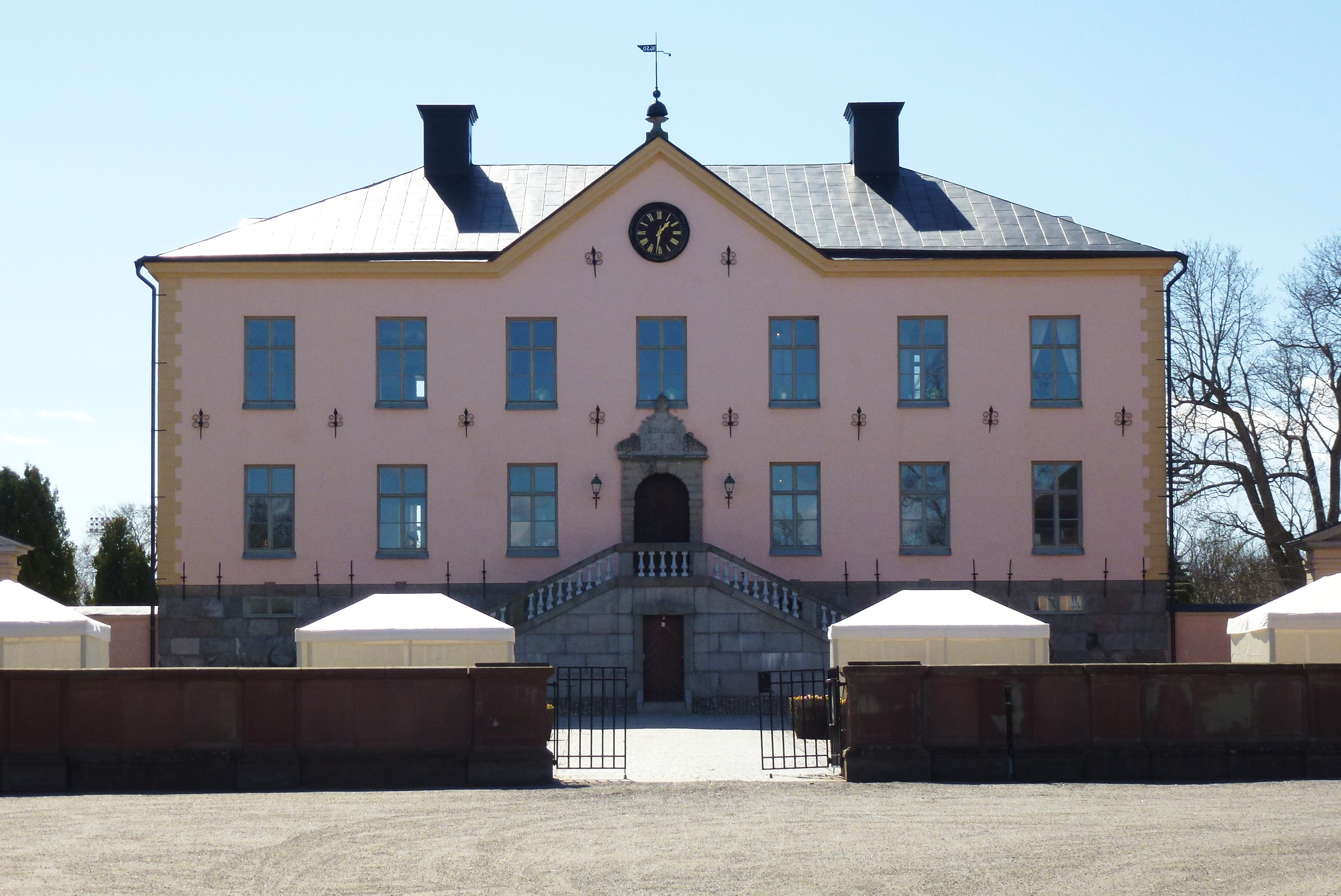 Hässelby slott huvudbyggnad